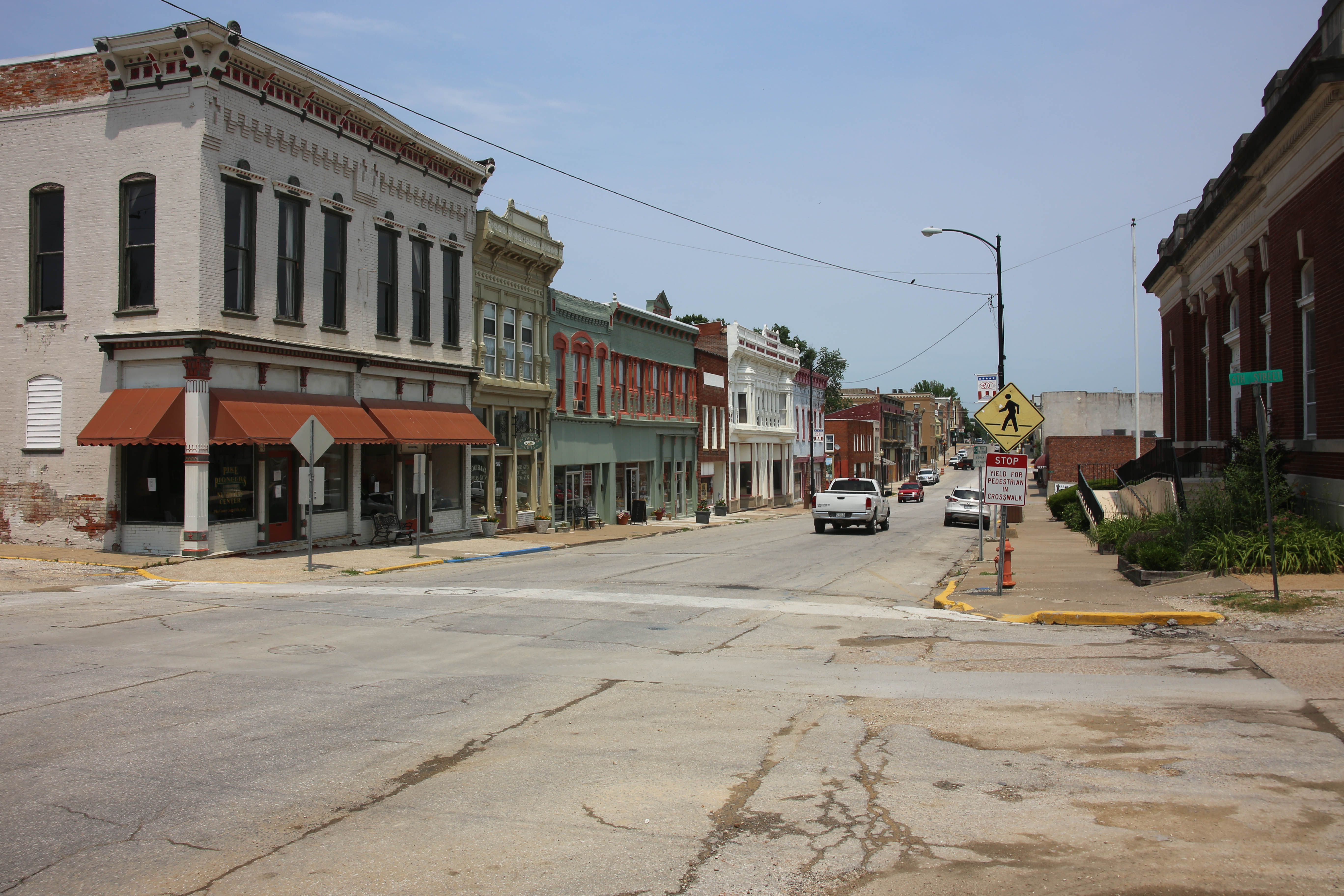 Georgia Avenue - Louisiana, Missouri